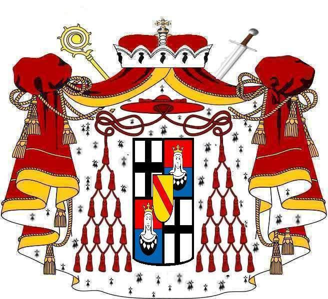 Wappen Kardinal Bernhard Gustav von Baden-Durlach, Fürstabt von Fulda 1671–1677, Fürstabt von Kempten 1673-1677